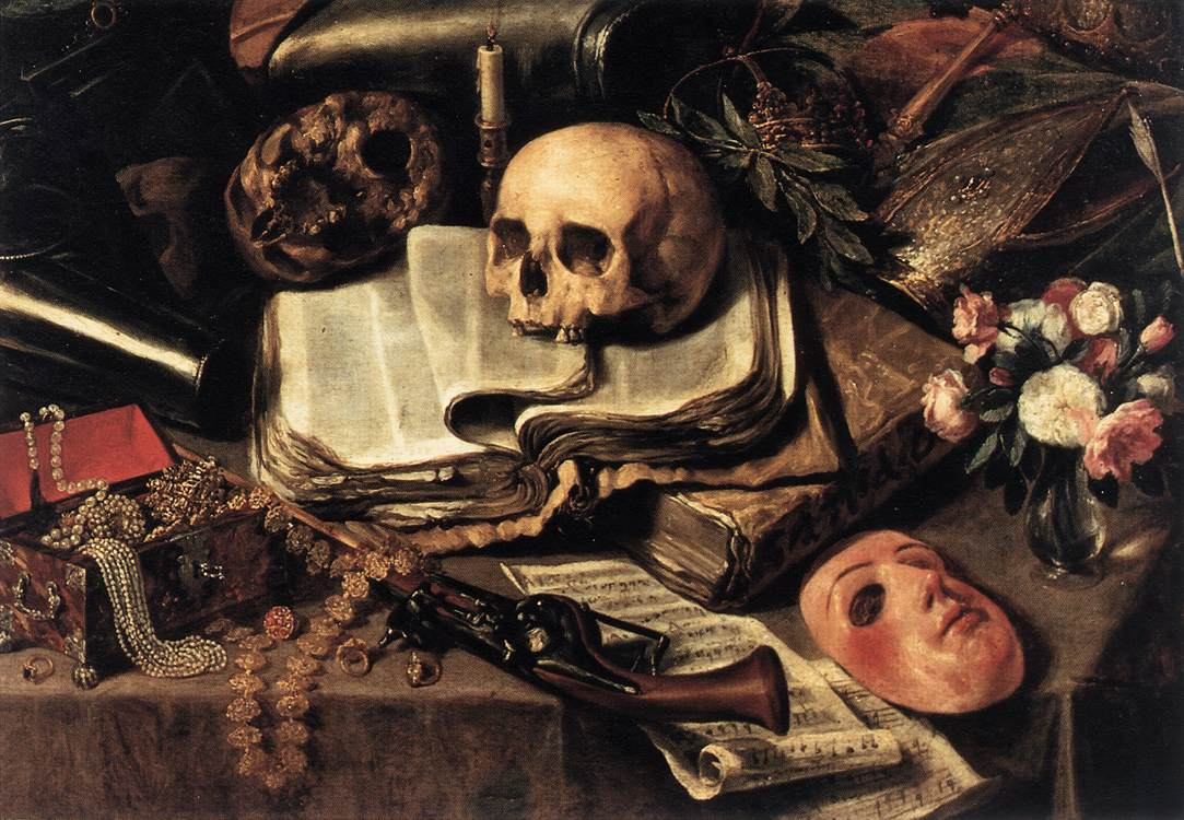 La obra representa a un caballero del siglo XVII vestido con la indumentaria de la época y dormido mientras un ángel le muestra el carácter efímero de los placeres, las riquezas, los honores y la gloria. El ángel le muestra el jeroglífico de la fecha sobre el sol, que hiere, vuela raudo y mata. El conjunto de objetos situados sobre la mesa constituye un auténtico bodegón en el que se establece una condensación de símbolos y alegorías. Los símbolos de la mesa son muy complejos, pero destacan algunos por su presencia continua en todas las "vanitas": la calavera que simboliza la muerte, la máscara de teatro sobre la hipocresía, las joyas y el dinero que son las riquezas que no podemos llevar al otro mundo, la baraja y las armas como el juego y los placeres de la caza, el reloj que indica el paso inexorable del tiempo, la vela apagada que indica la extinción de la vida... son innumerables los objetos y los múltiples significados engarzados que podemos entresacar de todos ellos. El pintor ha representado un "corpus" de los objetos de la vanidad del mundo y de su sin sentido tratados con una definición magistral que los individualiza como forma de acentuar, a través de lo real, la presencia de su carácter didáctico, alegórico y moral.